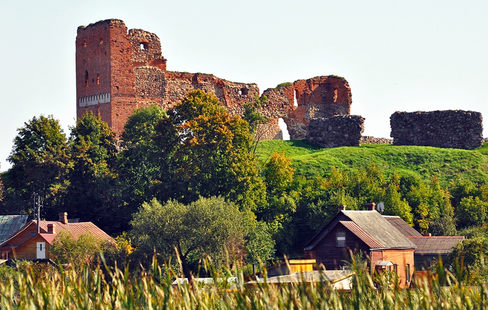 Vaade pealinnusele.